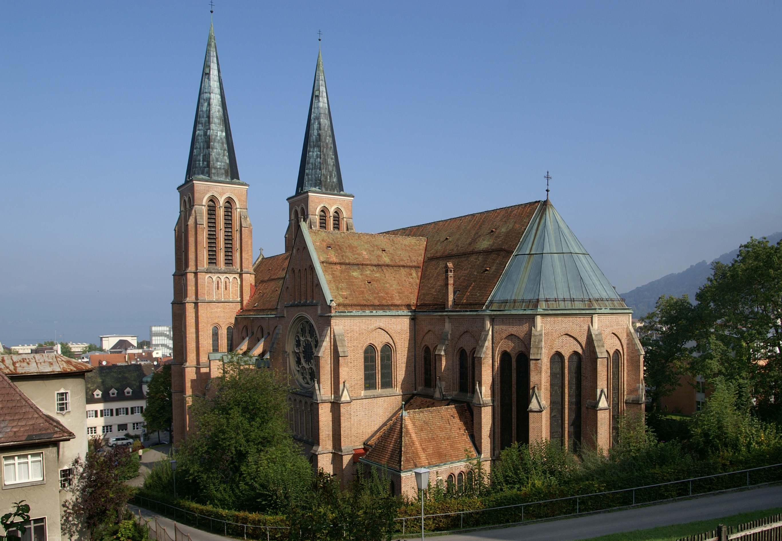 Herz-Jesu-Kirche in Bregenz. Architekt: Joseph Cades Baujahre 1905/08, Baumeister: Kornel Rhomberg aus Bregenz sowie Paul Faulhaber aus Rottweil.